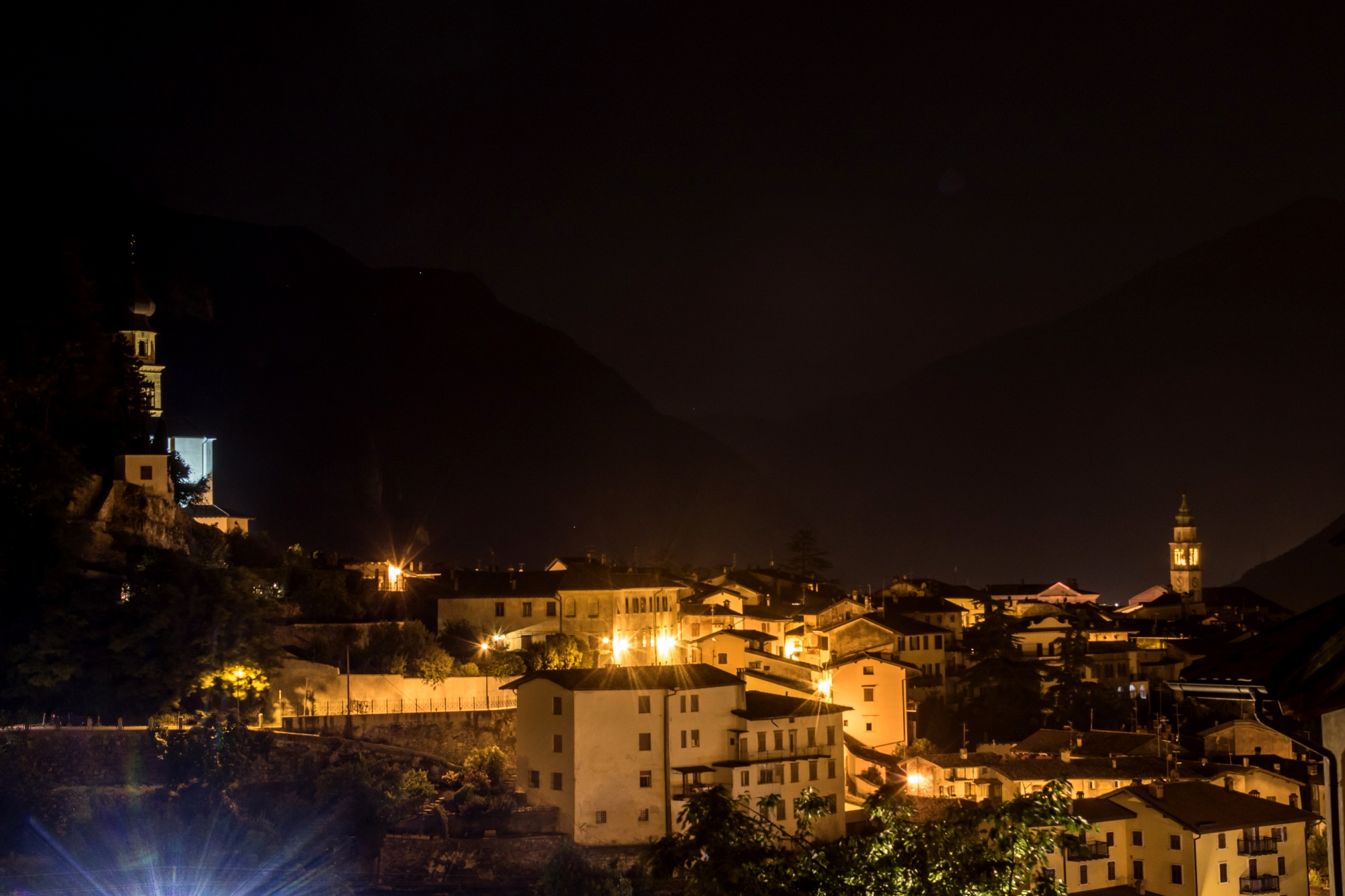 Chiesa di San Giovanni This is a photo of a monument which is part of cultural heritage of Italy.